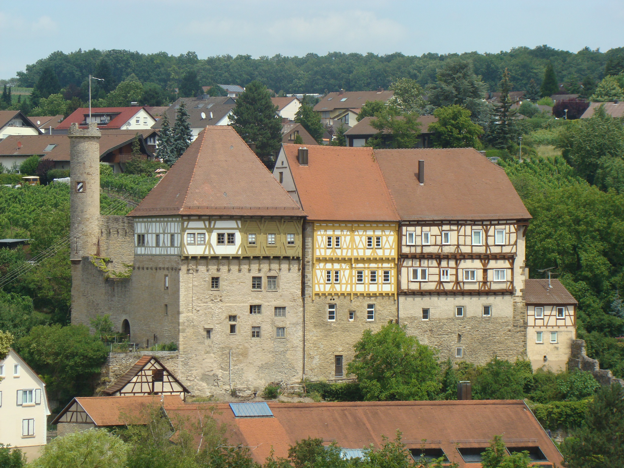 Oberes Schloss in Talheim (Landkreis Heilbronn)